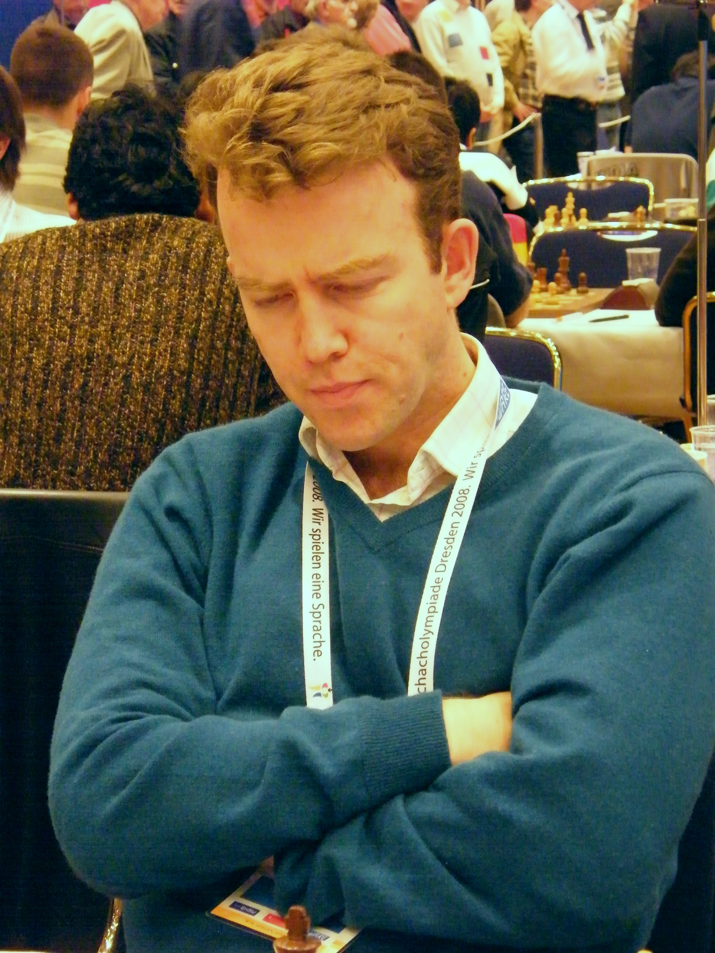 Jonathan Rowson bei der 38. Schacholympiade in Dresden 2008